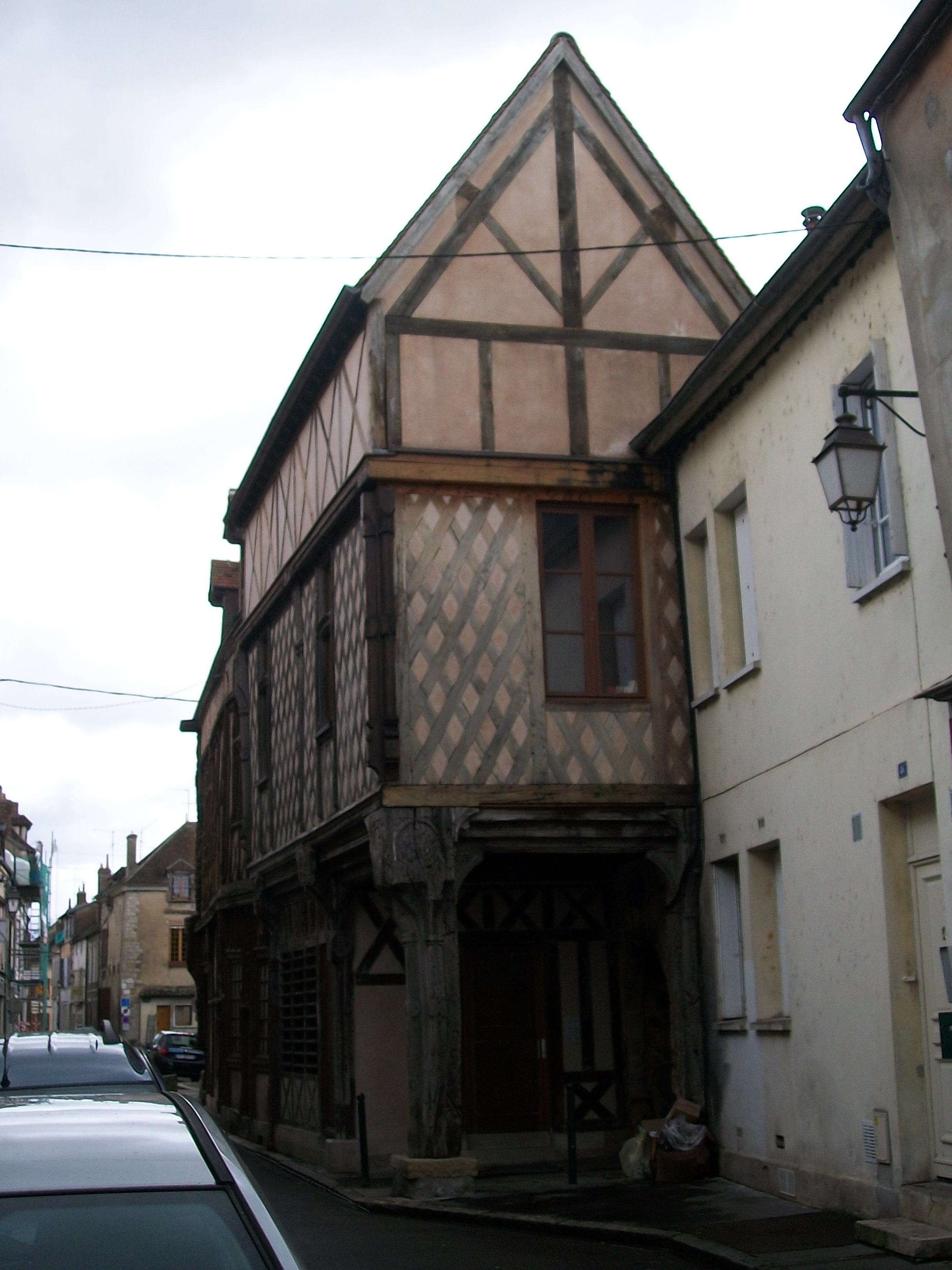 Maison du Portail (Classé) .